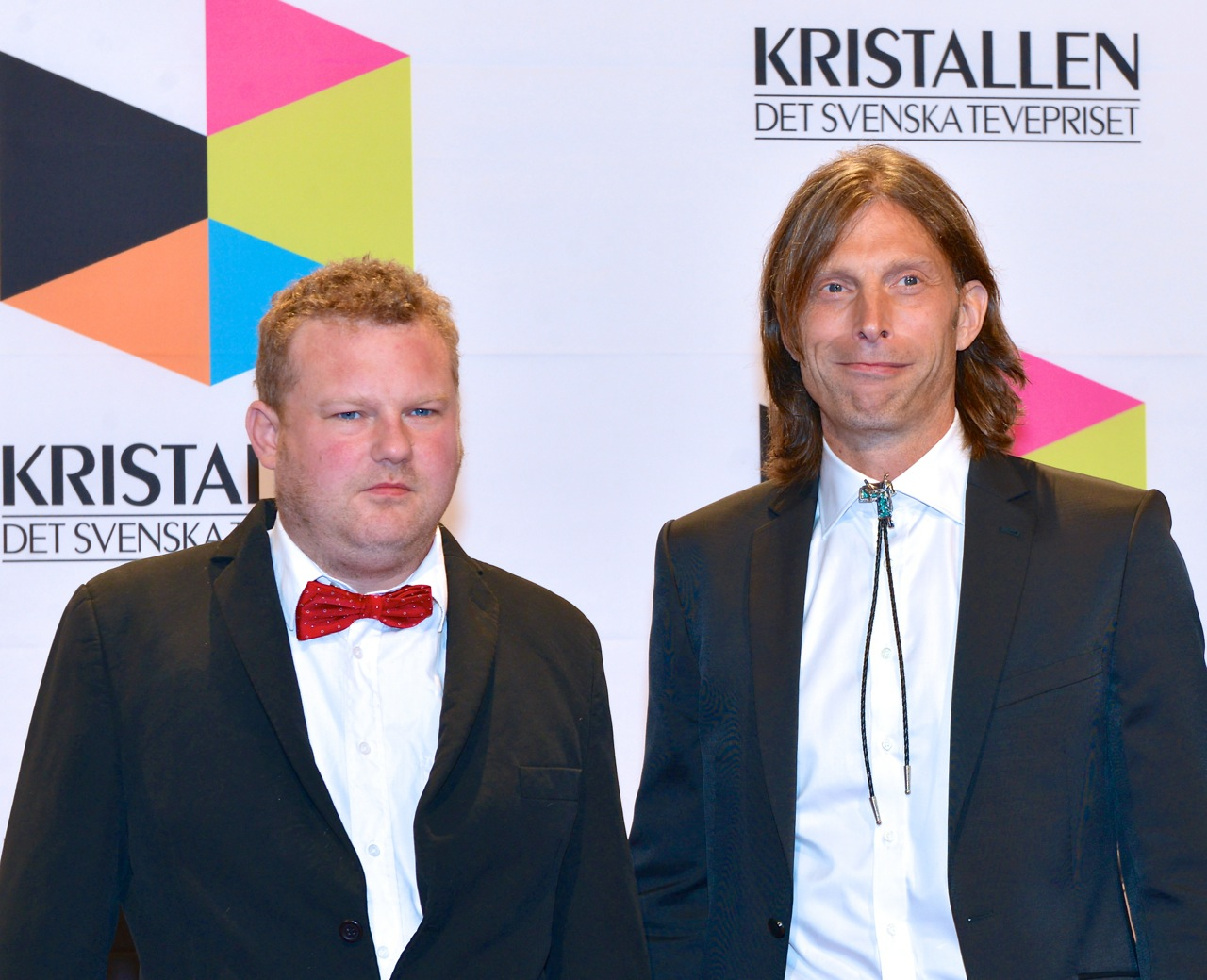 Morgan Karlsson och Ola-Conny Wallgren från tv-serien "Ullared" och "En stark resa med Morgan & Ola-Conny" på Kristallen-galan den 30 augusti 2013.